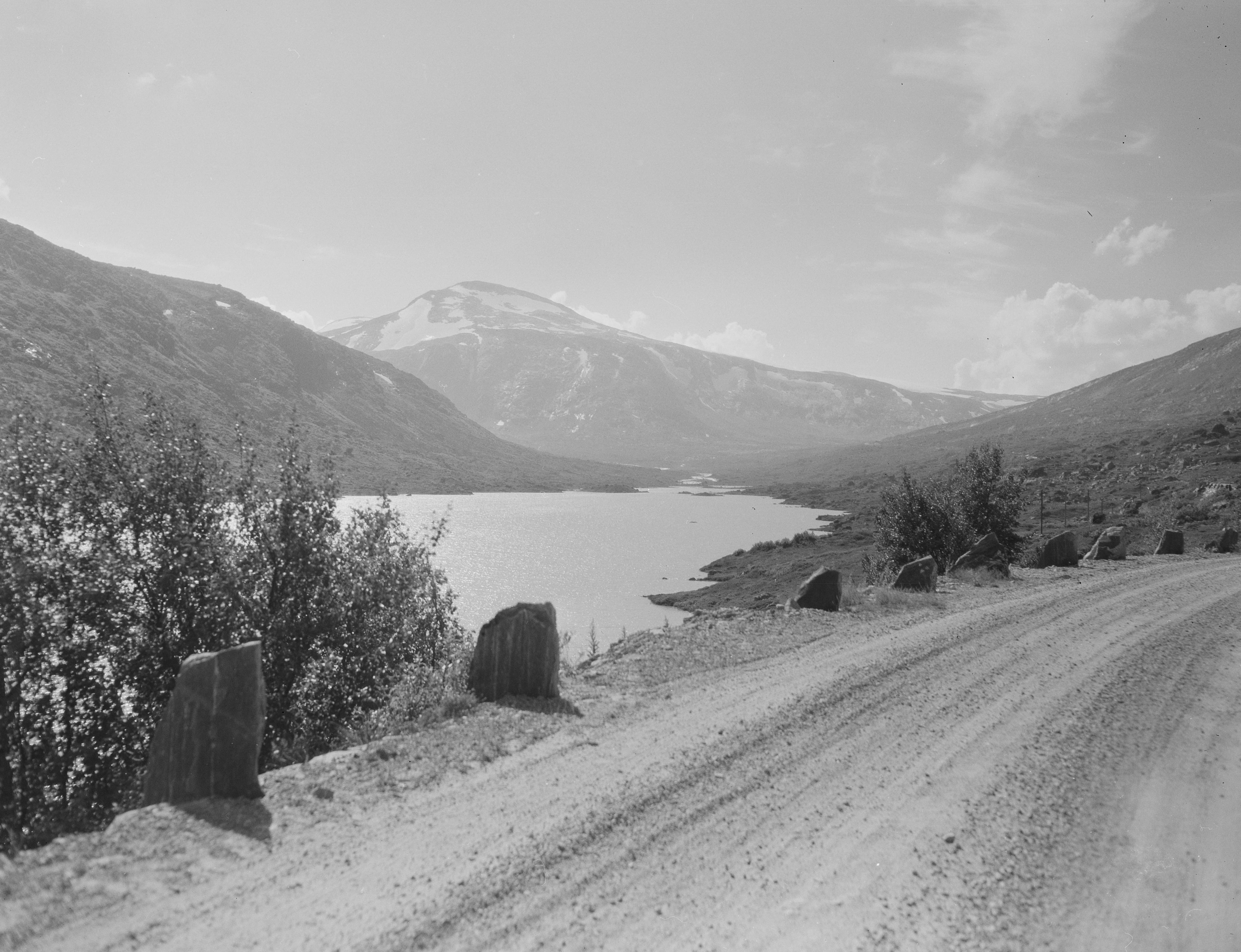 Bildet er hentet fra Nasjonalbibliotekets bildesamling. Anmerkninger til bildet var: Fotograf : ukjent Heillstuguvatnet,Raudeggi,Strynefjellet, Skjåk, Oppland